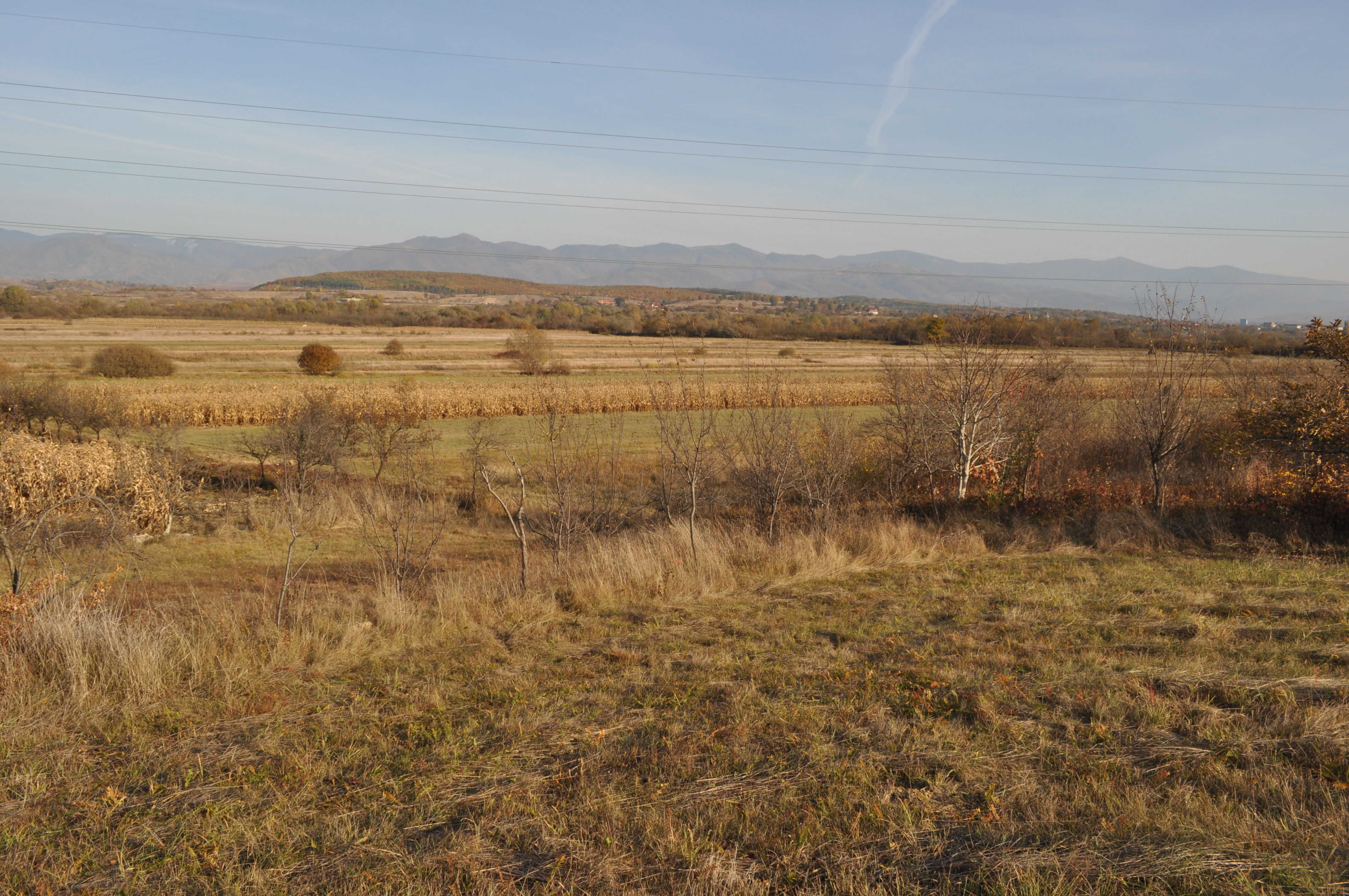 Biserica de lemn „Sf. Trei Ierarhi" din Ghighișeni mutată la Cucuceni (împrejurimi)